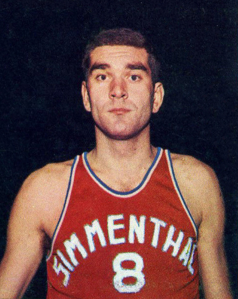 Figurina/Sticker CAMPIONI DELLO SPORT 1968/69 - n. 258 - MASINI - ITA -New